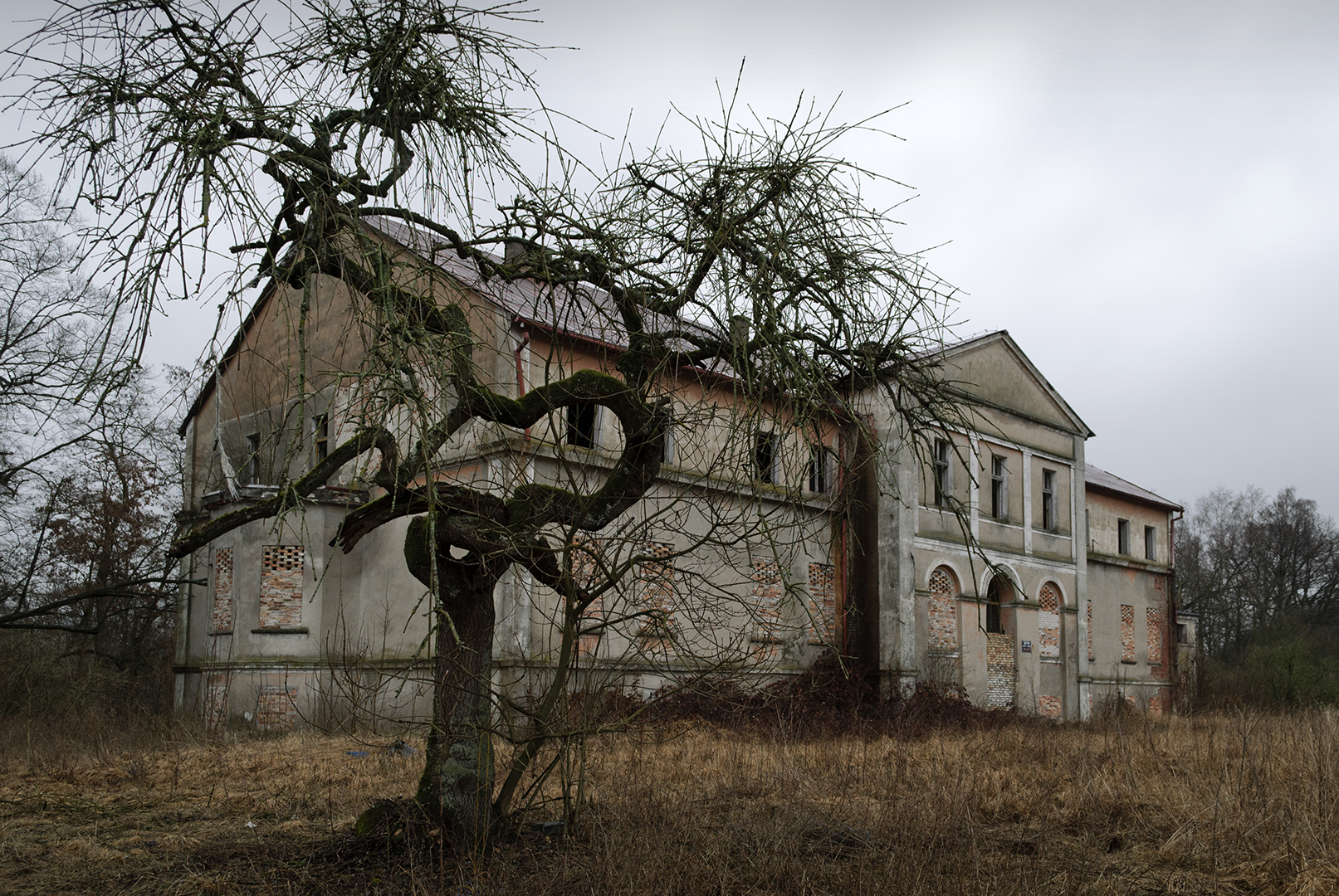 park dworski, pałac Konarzewo